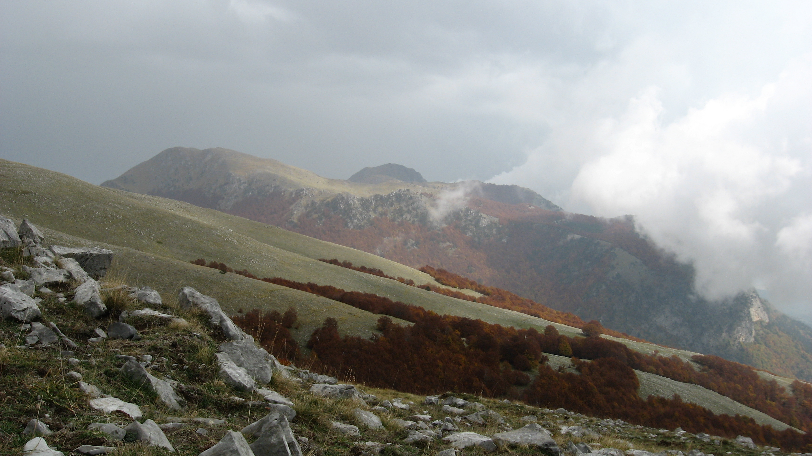 Monte Pollino (2.248 m) e serra Dolcedorme (2.267 m). Salendo su serra del Prete (2.181 m).